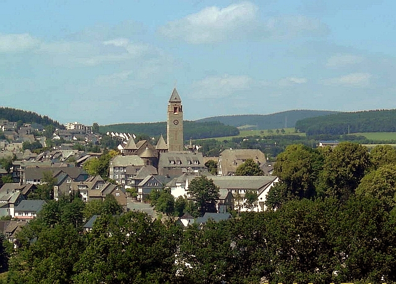 Schmallenberg (Kirche), Germany.